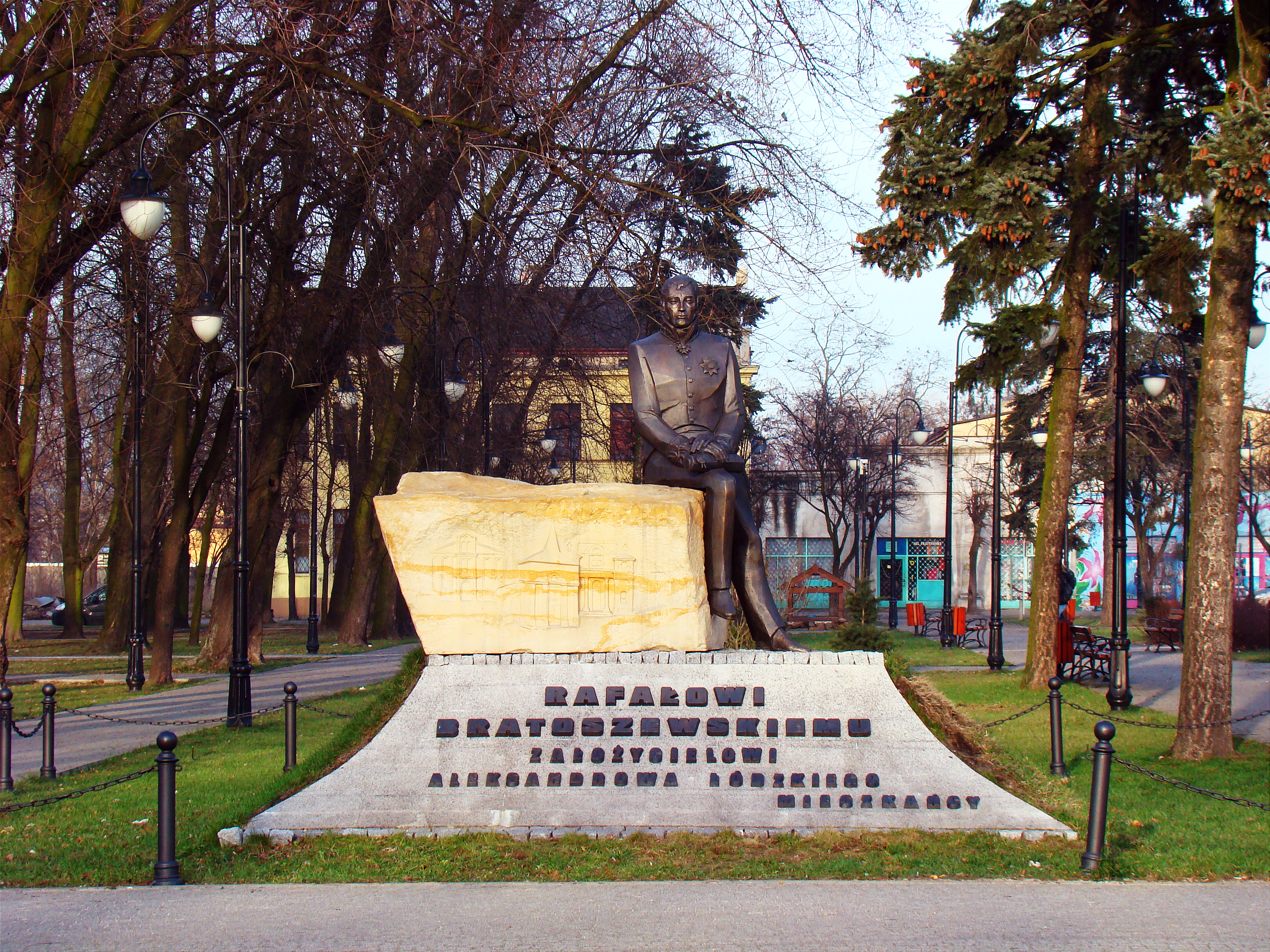 Pomnik Rafała Bratoszewskiego w Aleksandrowie Łódzkim (powiat zgierski, województwo łódzkie), Polska